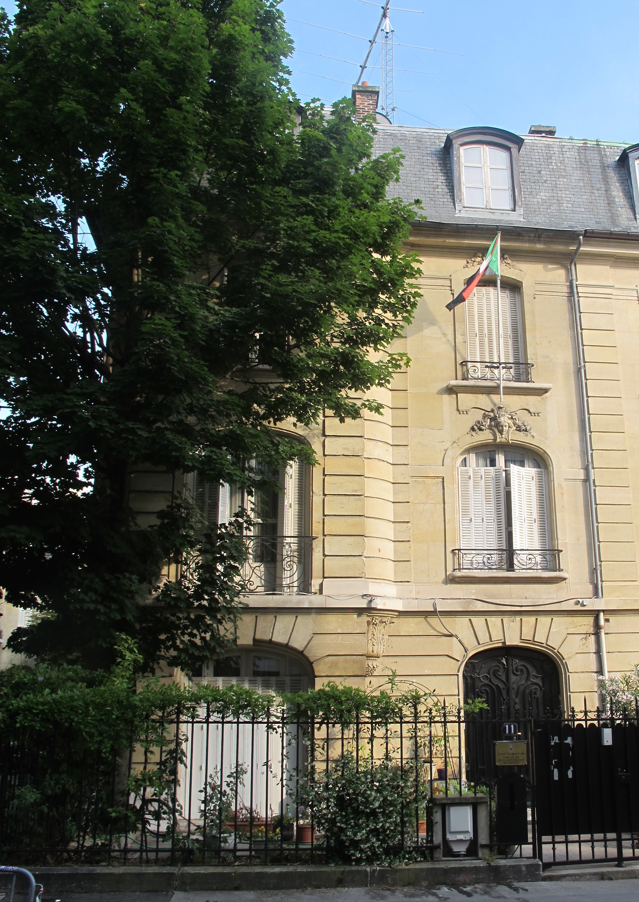 Ambassade du Soudan en France, n°11 rue Alfred Dehodencq (Paris, 16e).